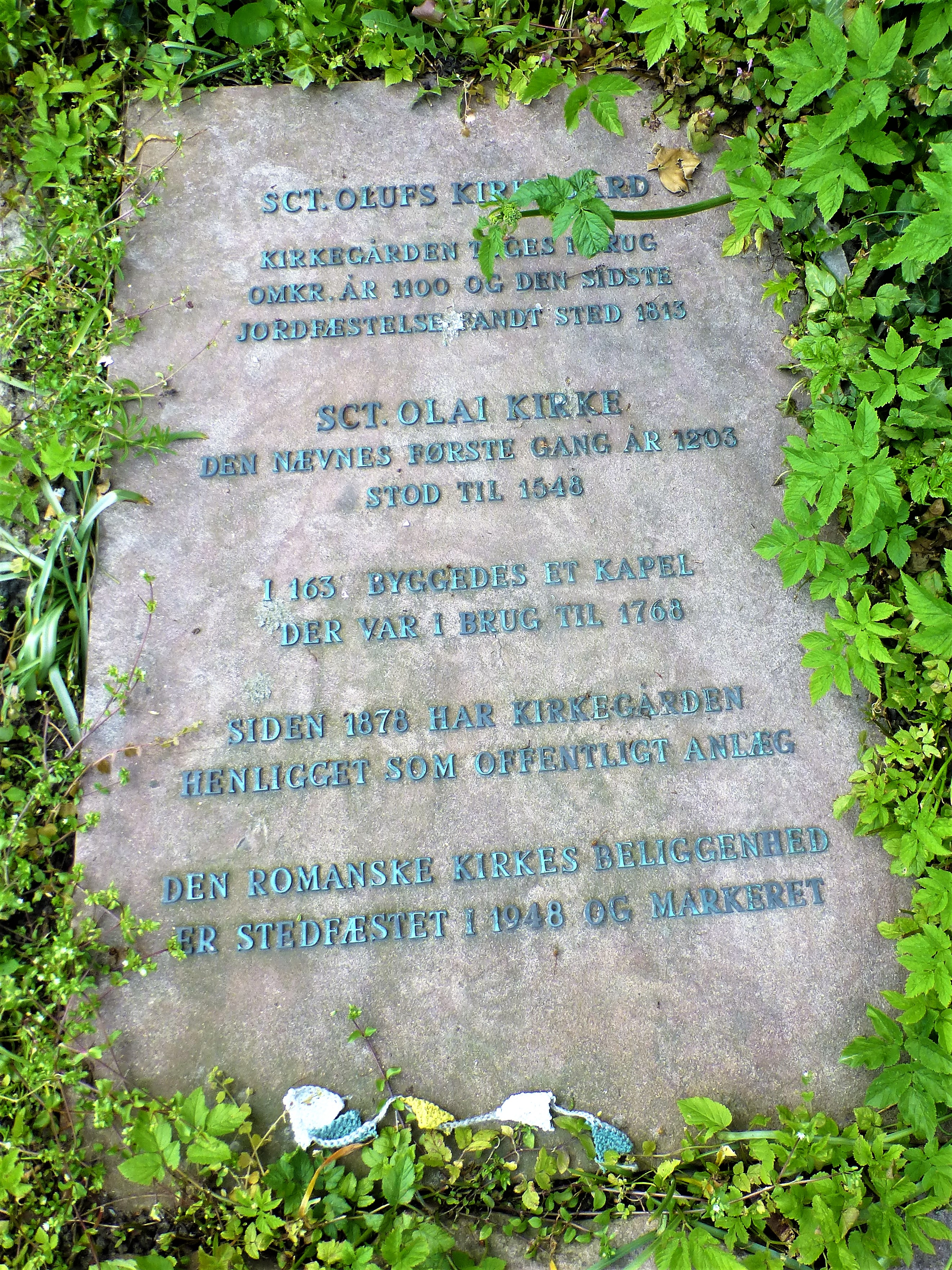 Mindetavle for Sankt Oluf Kirke